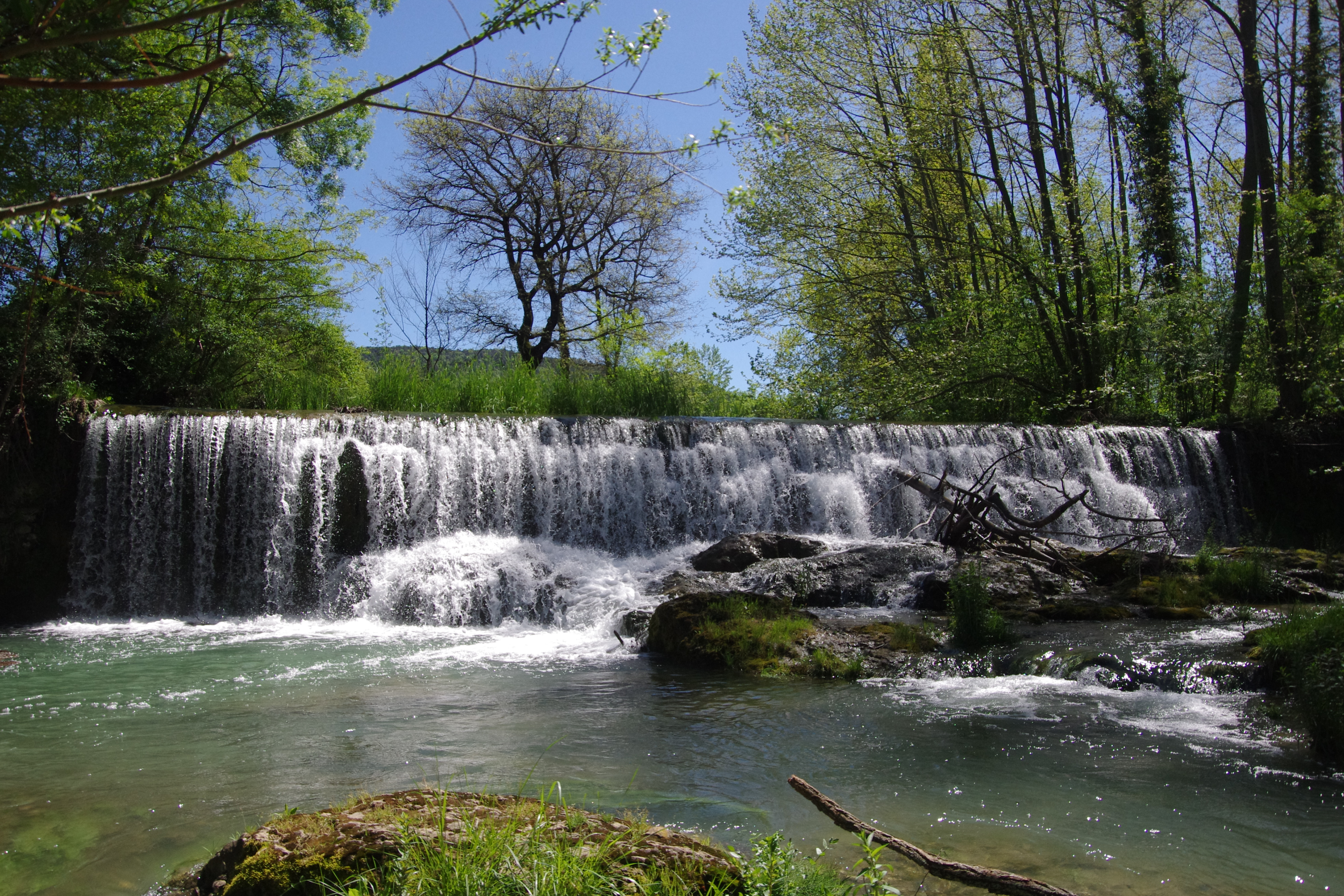 Muntanyes de Rocacorba This is a a photo of a natural area in Catalonia, Spain, with id: ES510144